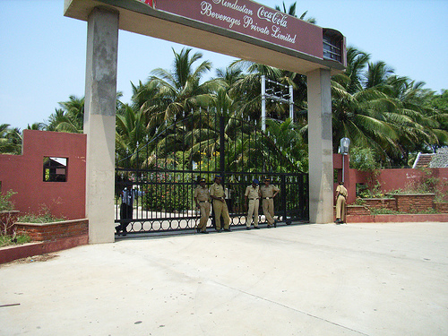 പ്ലാച്ചിമട-കൊക്കോകോള‌ഫാക്റ്ററി